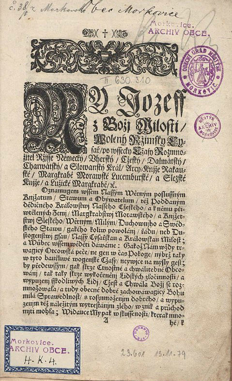 Titulní strana knihy Geho Milosti Ržimského Cýsaře Vherského a Cžeského Krále ec... z fondu Vědecké knihovny v Olomouci